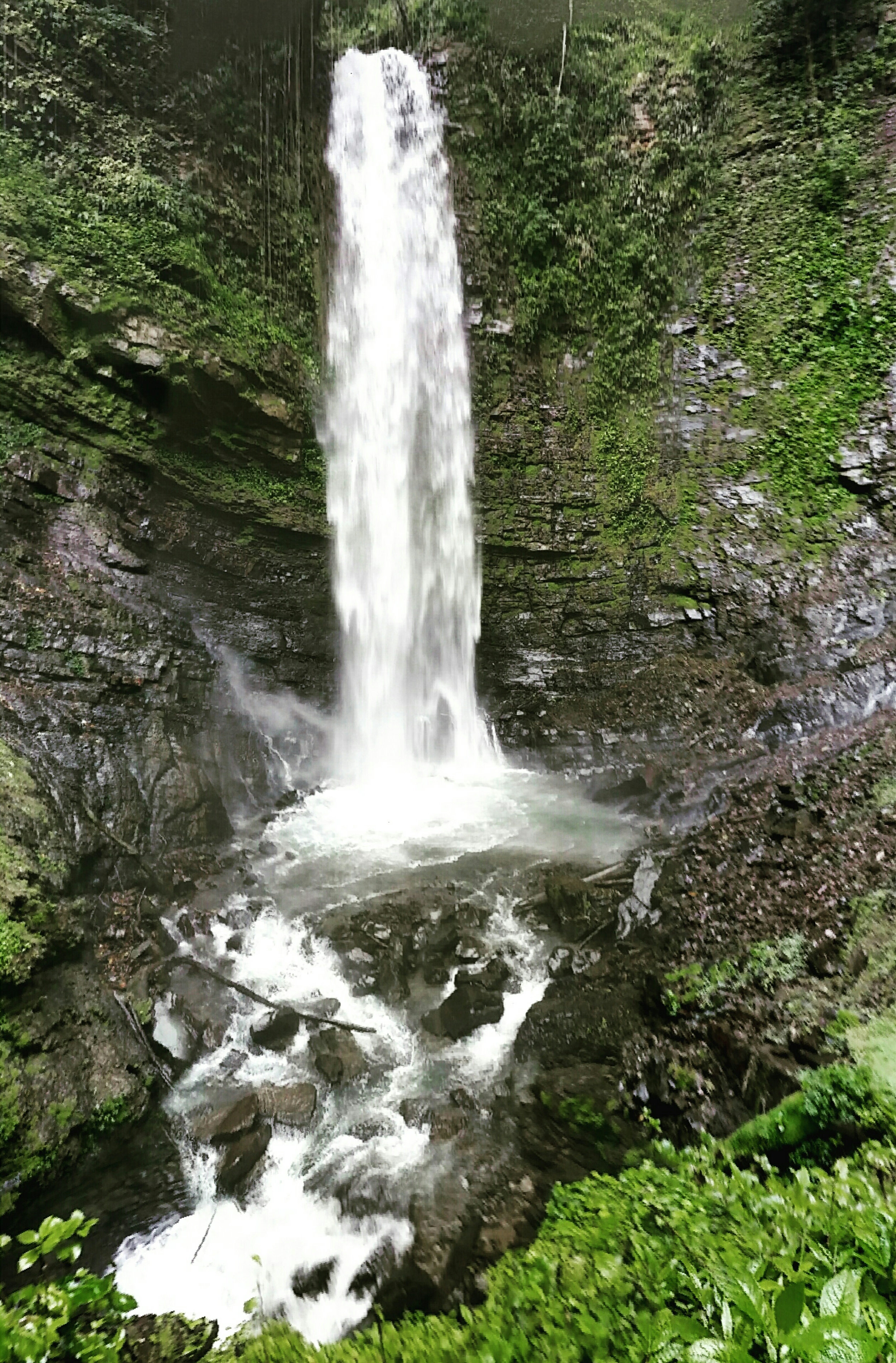 55 metros de altura